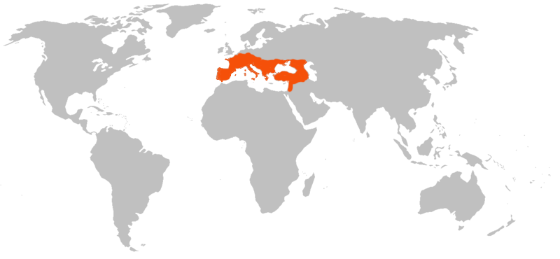 Mapa de distribucción de Noemys anomalus